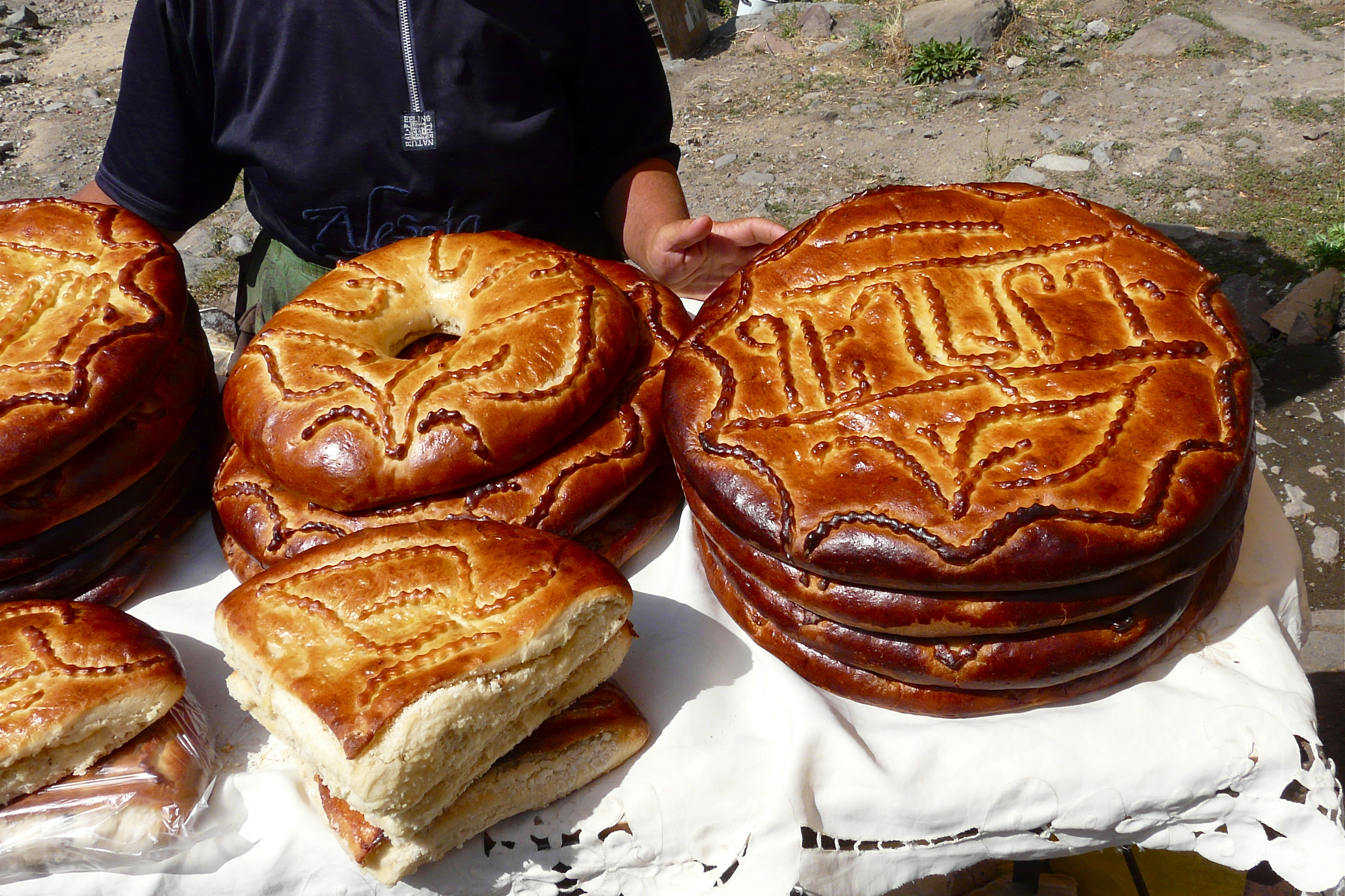 Een lekker, vers gebakken en mals stukje suikerbrood? Alleen te verkrijgen aan het holenklooster Geghard!